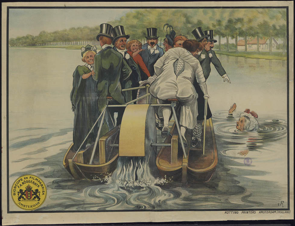 Nöggerath-filmfabriek Maker Arnold van Roessel